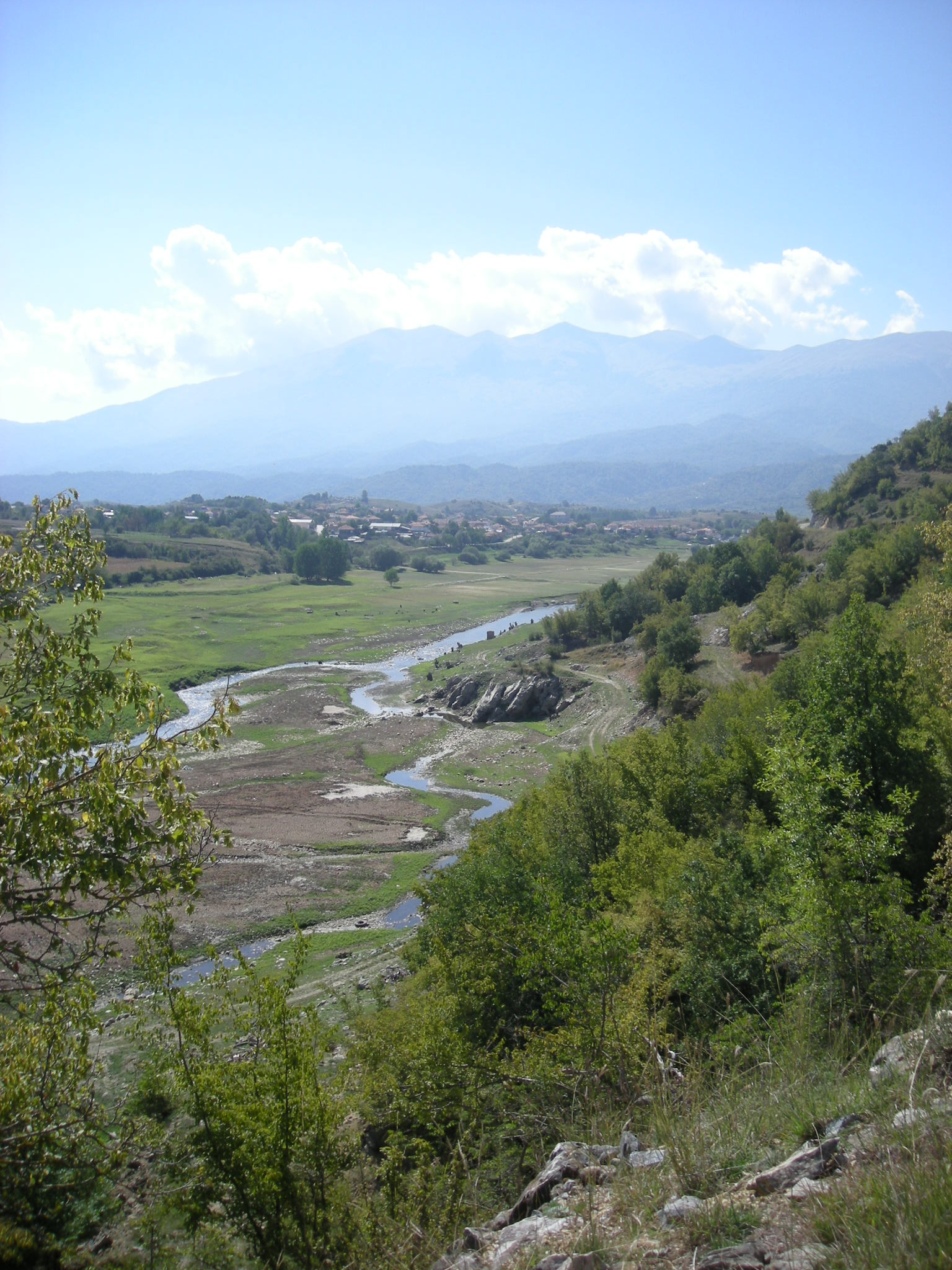 Οι Ποταμοί από το ξώκλησι του Άγιου Ραφαήλ. Bλέπεται και τον Δεσπάτη